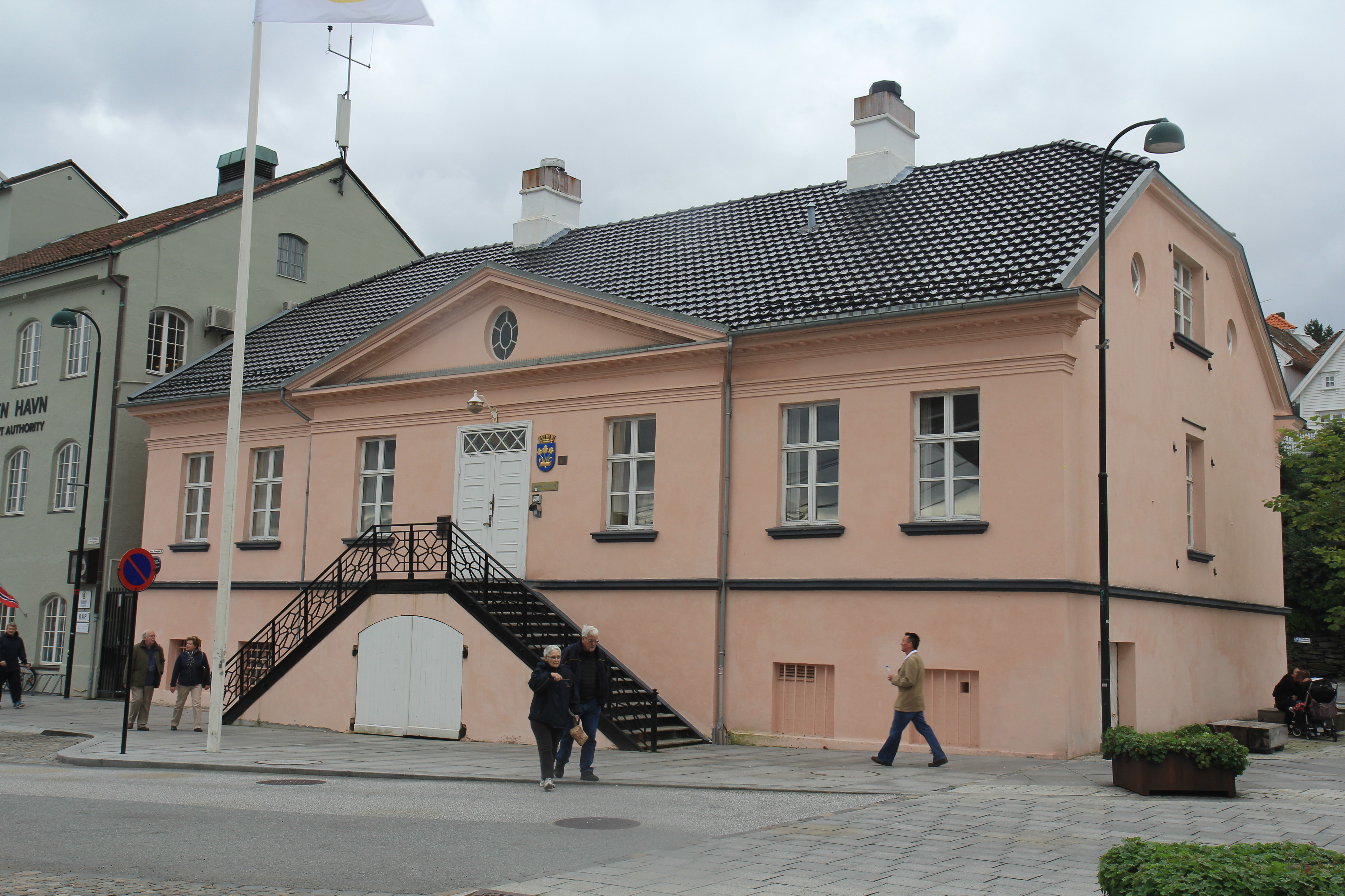 Gamle tollbod, Stavanger 2013